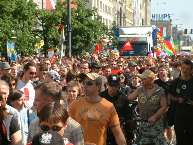 Poland, Warsaw, Parada Równości